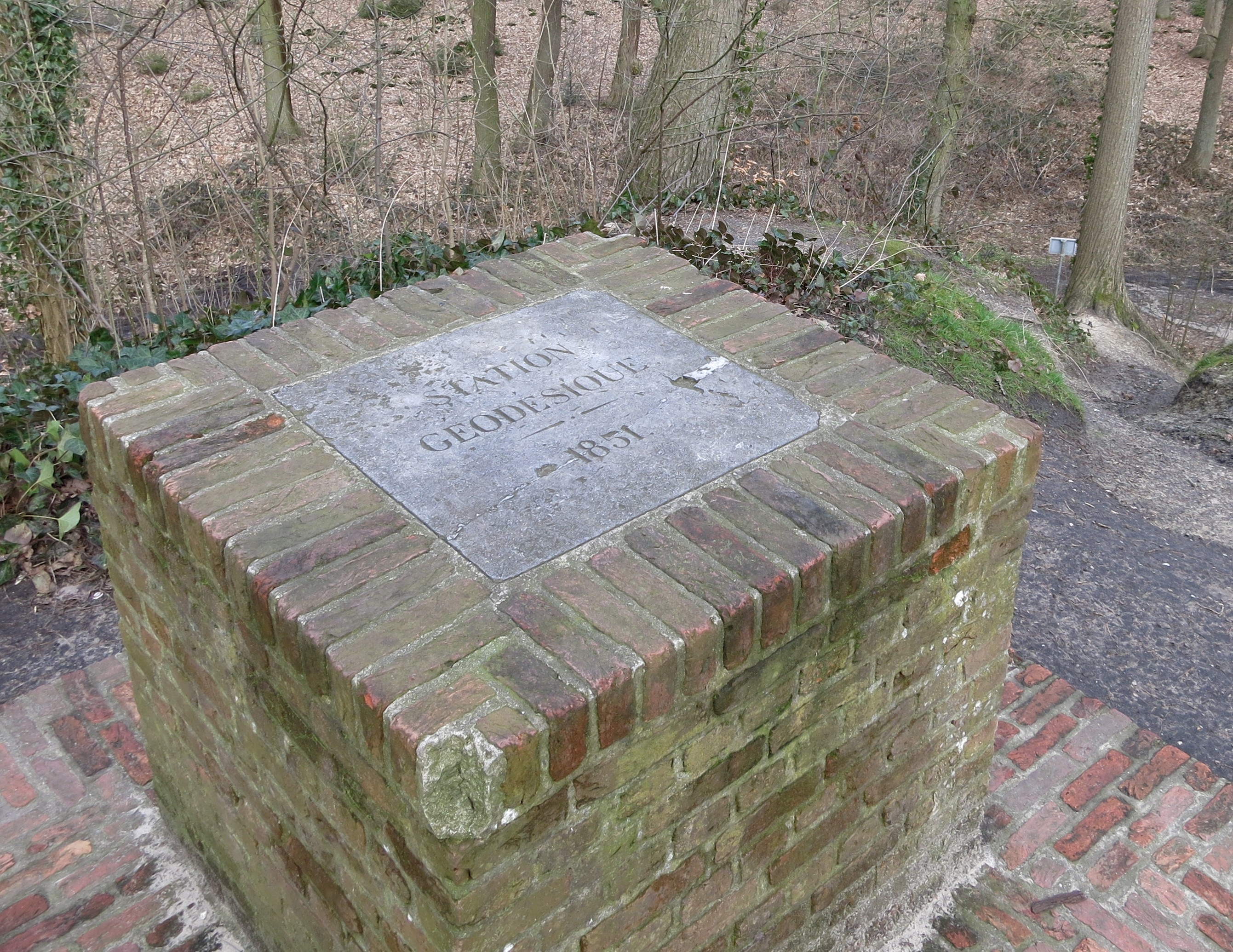 Geodetisch punt uit 1851 op kunstmatige heuvel in het Koninklijk Park langs de Koning Leopold II-laan in Leopoldsburg.